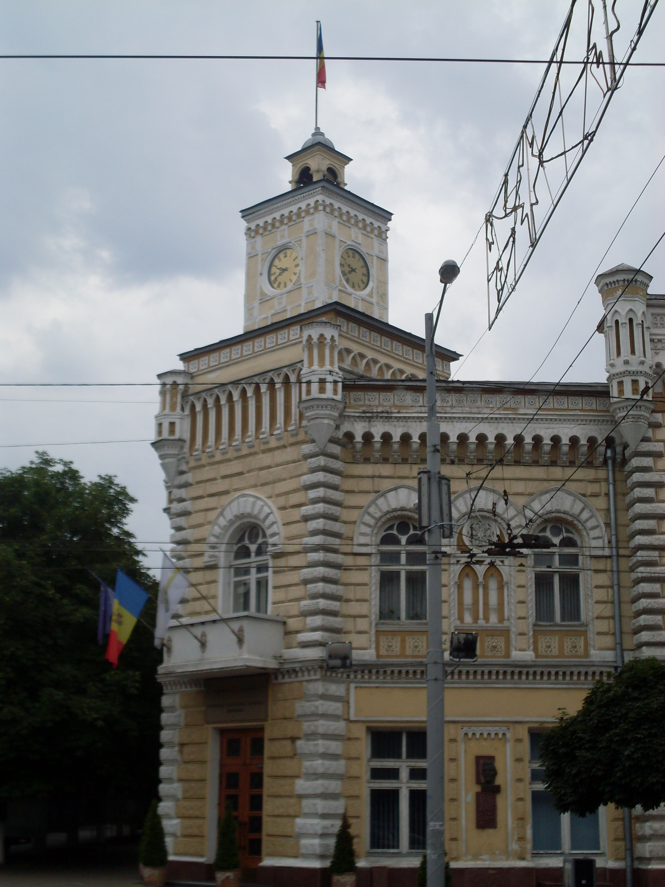 Primăria municipiului Chişinău